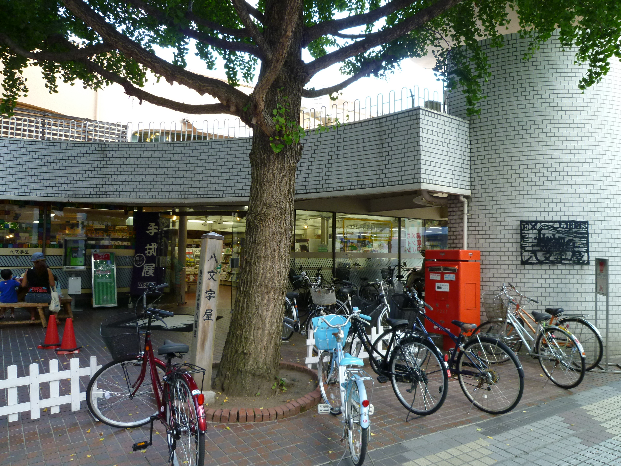 八文字屋本店（山形市七日町）。